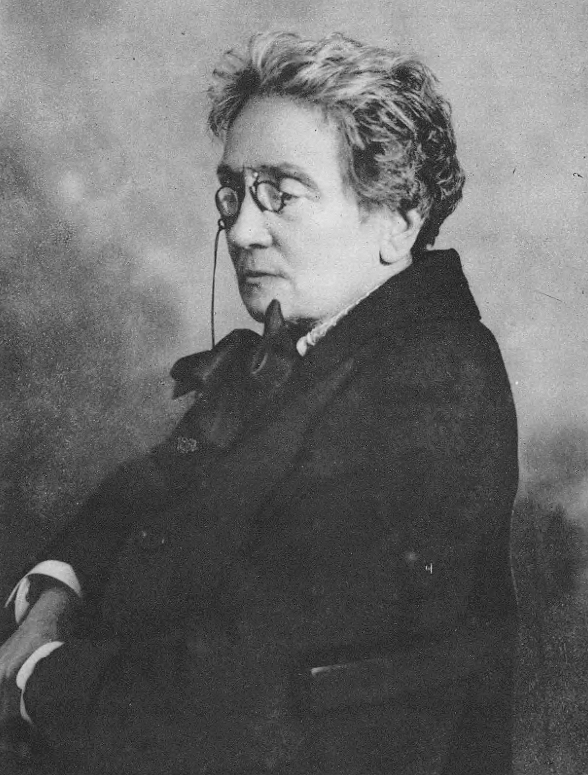 Maria Dulębianka